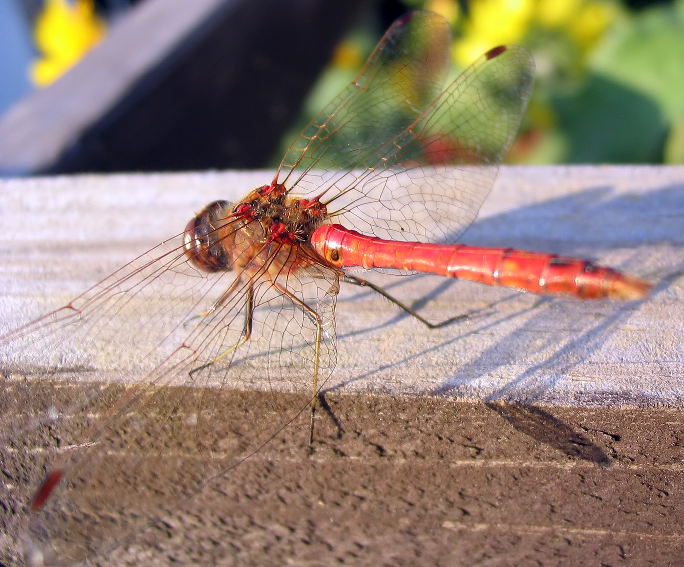 Beschreibung: Große Heidelibelle (Sympetrum striolatum) / Männchen Fotograf: Darkone, 6. September 2004